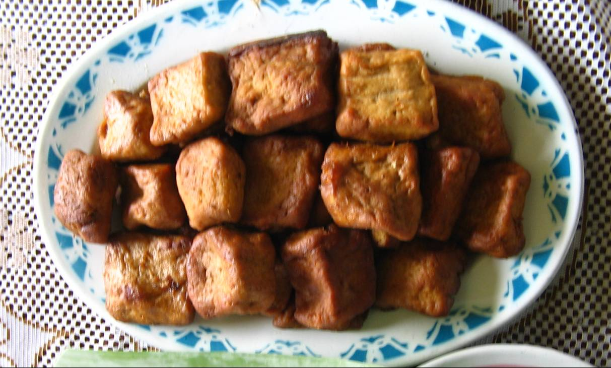 Tahu yang dibacem. Dimakan sendiri dengan cabai rawit, atau dimakan bersama-sama nasi/jadah (uli)